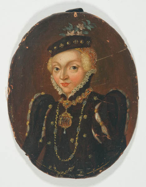 Anna Maria, Pfalzgräfin bei Rhein (1575-1643), Gemahlin Herzog Friedrich Wilhelms zu Sachsen, um 1600